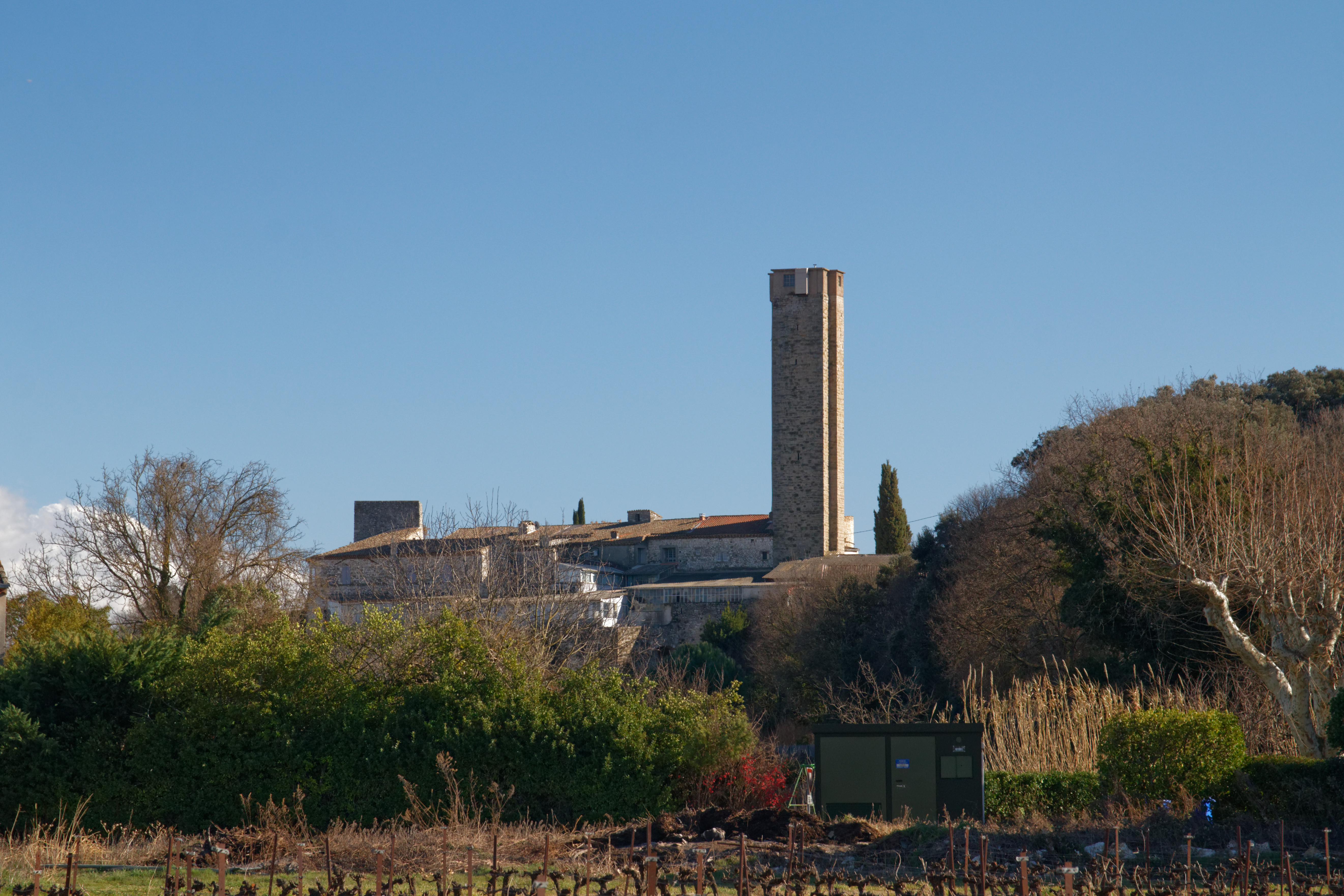 Boucoiran and Nozières castle.